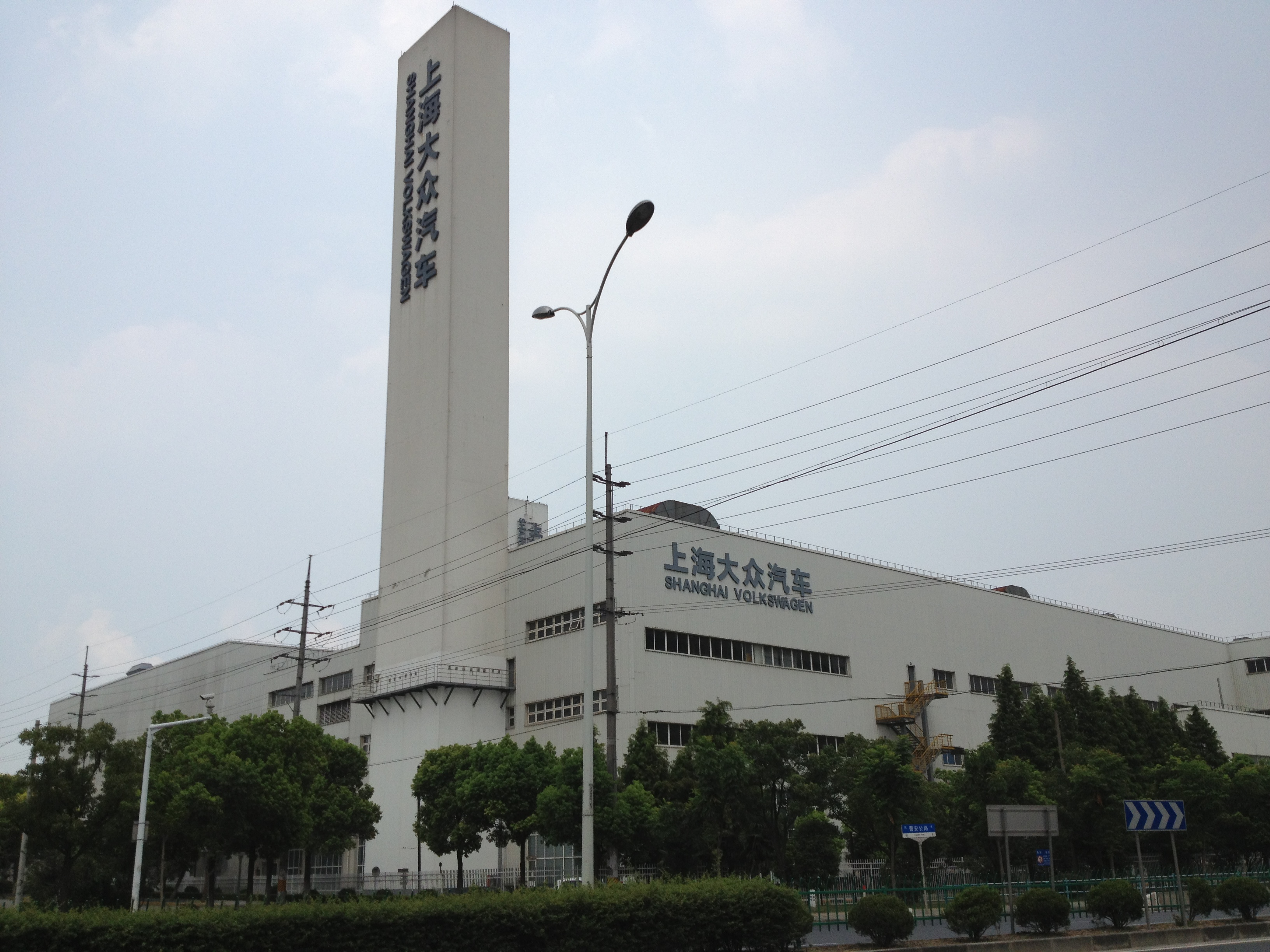 Volkswagenwerk in Shanghai